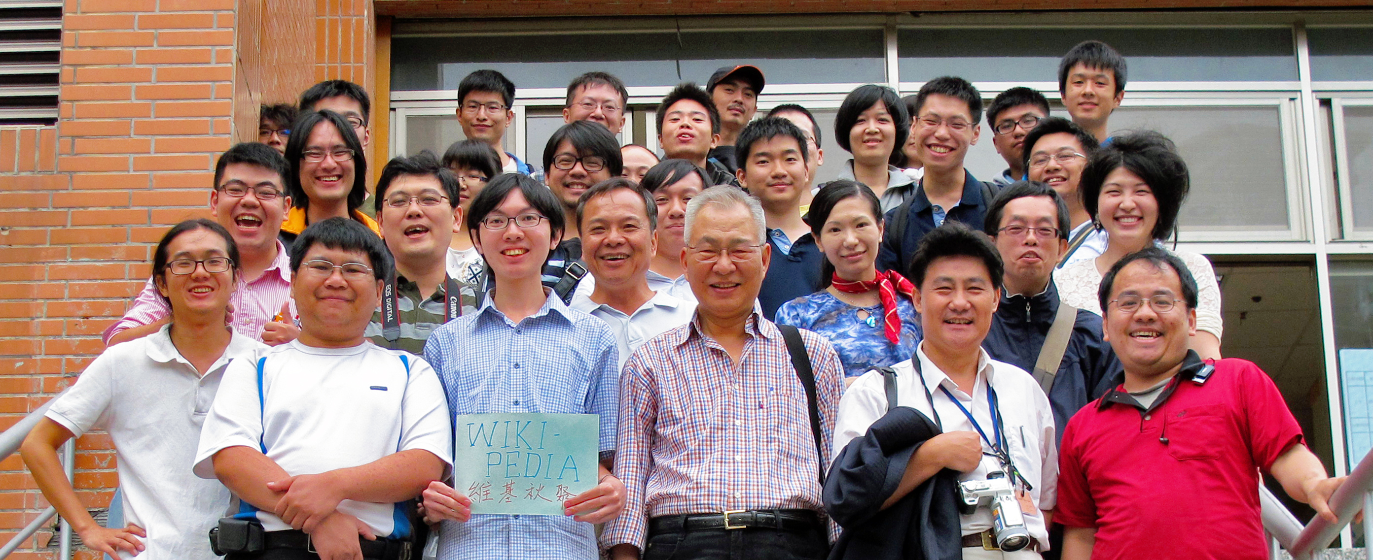 在台北木柵附近的私立大誠高中門口